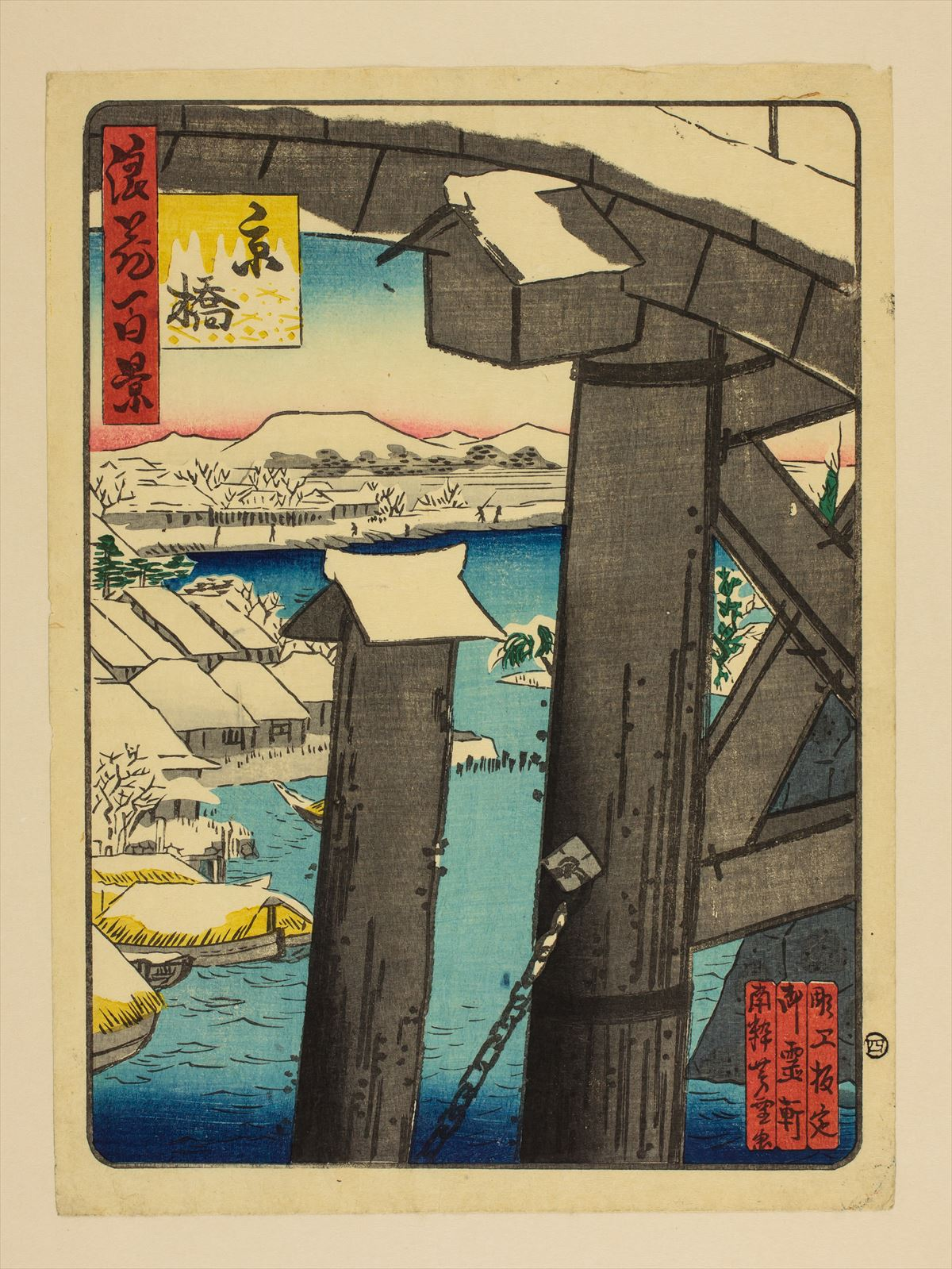 1800年代。南粋亭芳雪/画。浪花百景 102枚のうちの1枚。大阪市立中央図書館蔵。